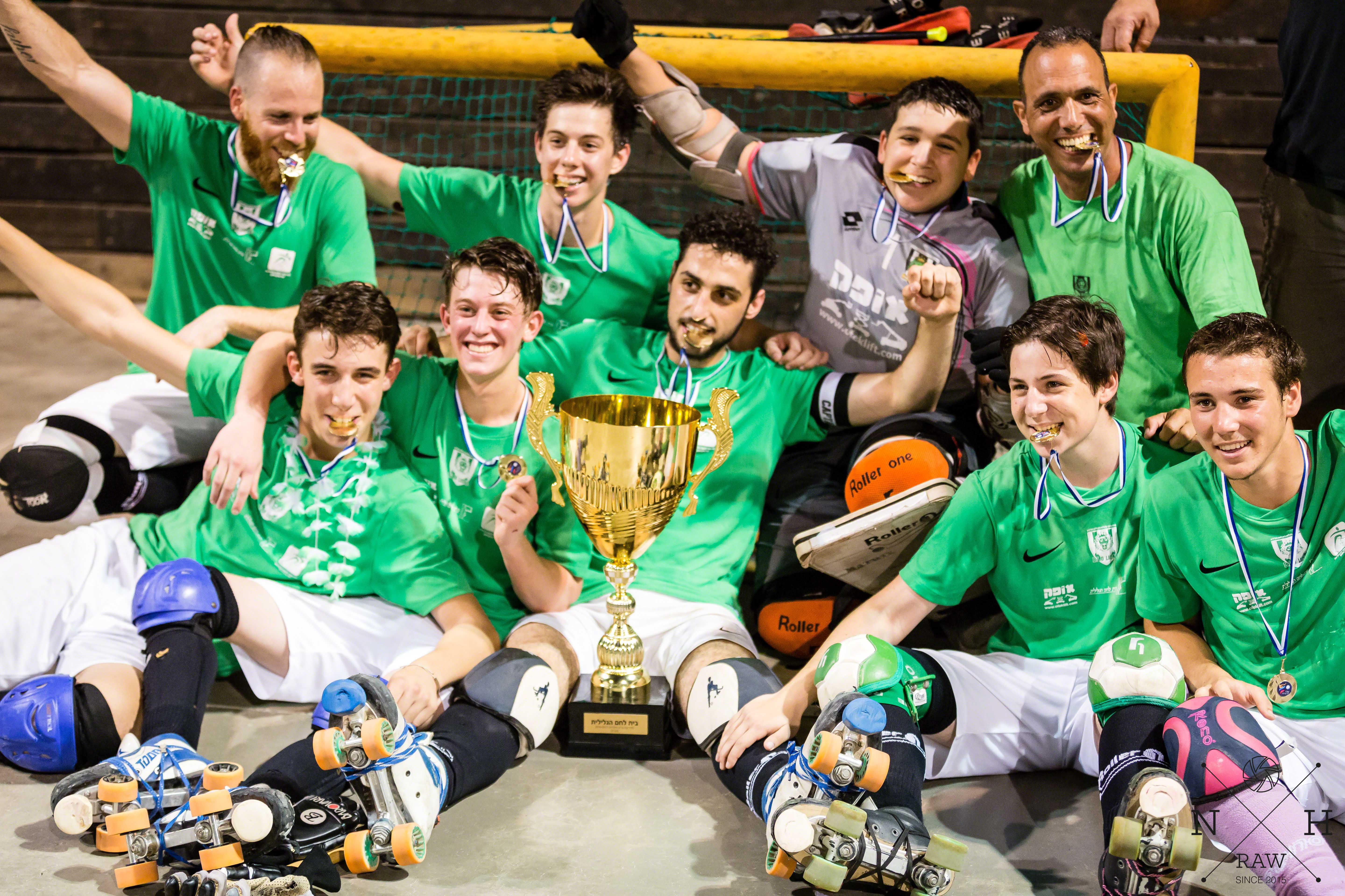 שחקני בית לחם חוגגים זכייה בגביע המדינה לשנת 2017